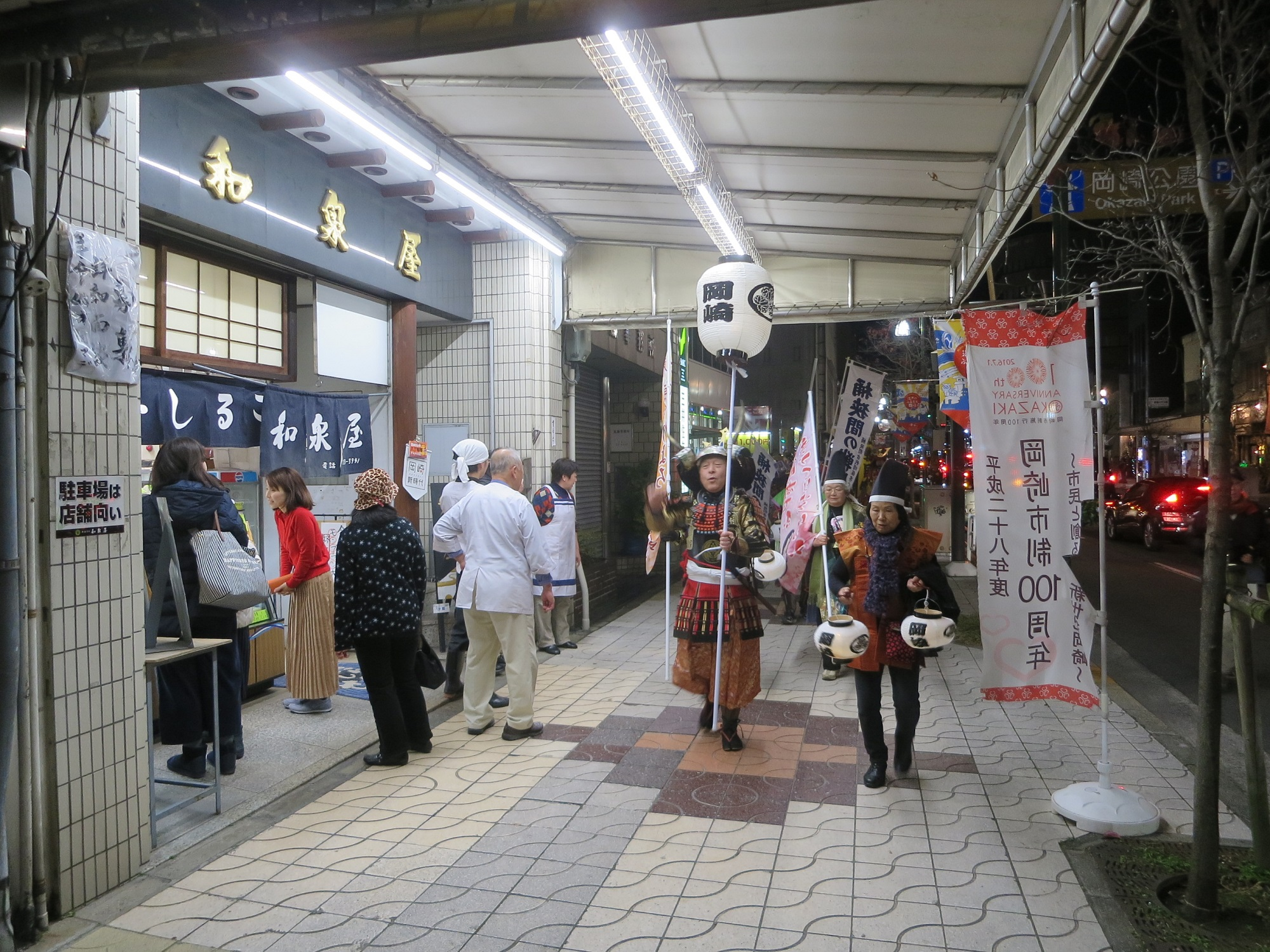 1932年創業の和泉屋（岡崎市康生通西）